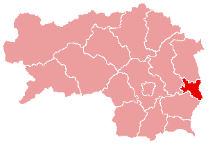 Karte: politischer Bezirk Fürstenfeld Lizenz: GFDL Quelle: Zeichnung plp Datum: de:2004 Ort: Wien